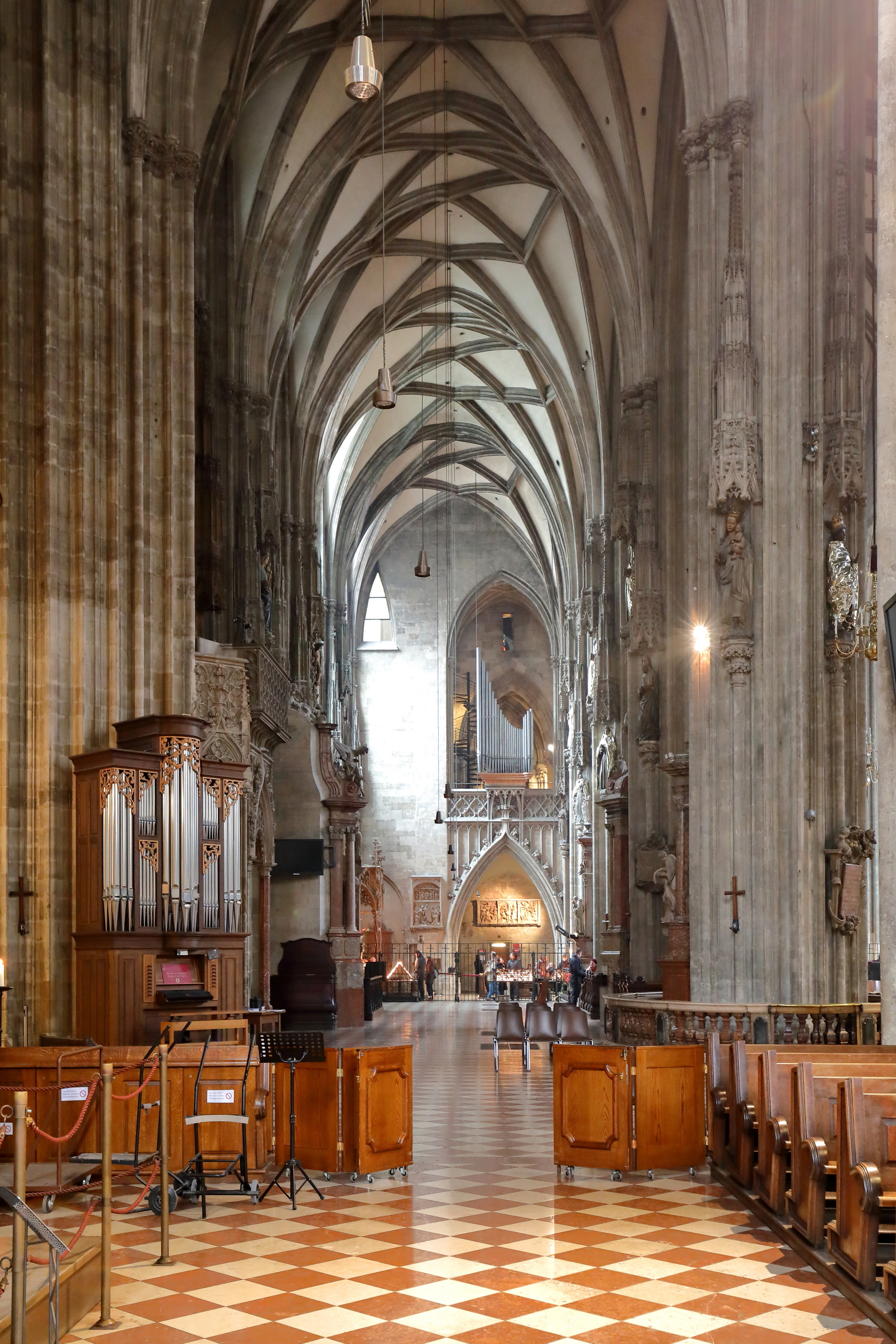 Das rechte Seitenschiff, auch als Apostelschiff bezeichnet, Richtung Empore des Stephansdoms in der österreichischen Bundeshauptstadt Wien.Das gotische dreischiffige Langhaus wurde über einer Vorgängerkirche im 15. Jahrhundert errichtet. Die Orgel im Vordergrund wurde von der Orgelbaufirma Rieger anlässlich dem 200. Todestag von Joseph Haydn 2009 gefertigt. Im Hintergrund das rechte Brüstungspositiv der von 1956 bis 1960 gefertigten Kauffmann-Orgel.